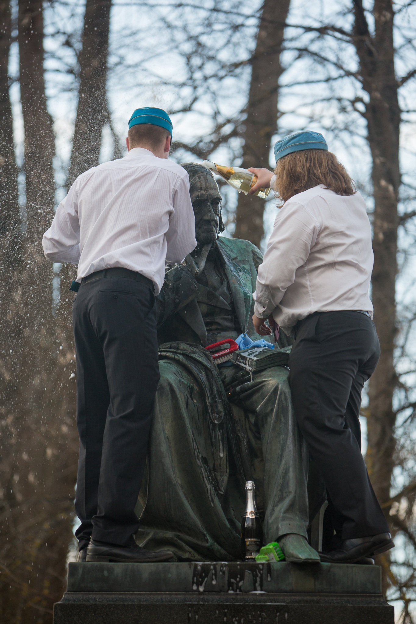 Eesti Üliõpilaste Seltsi noorliikmed pesemas Baeri monumendi pead vahuveiniga.